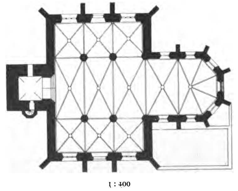 Grundriss der Klosterkirche in Wiedenbrück